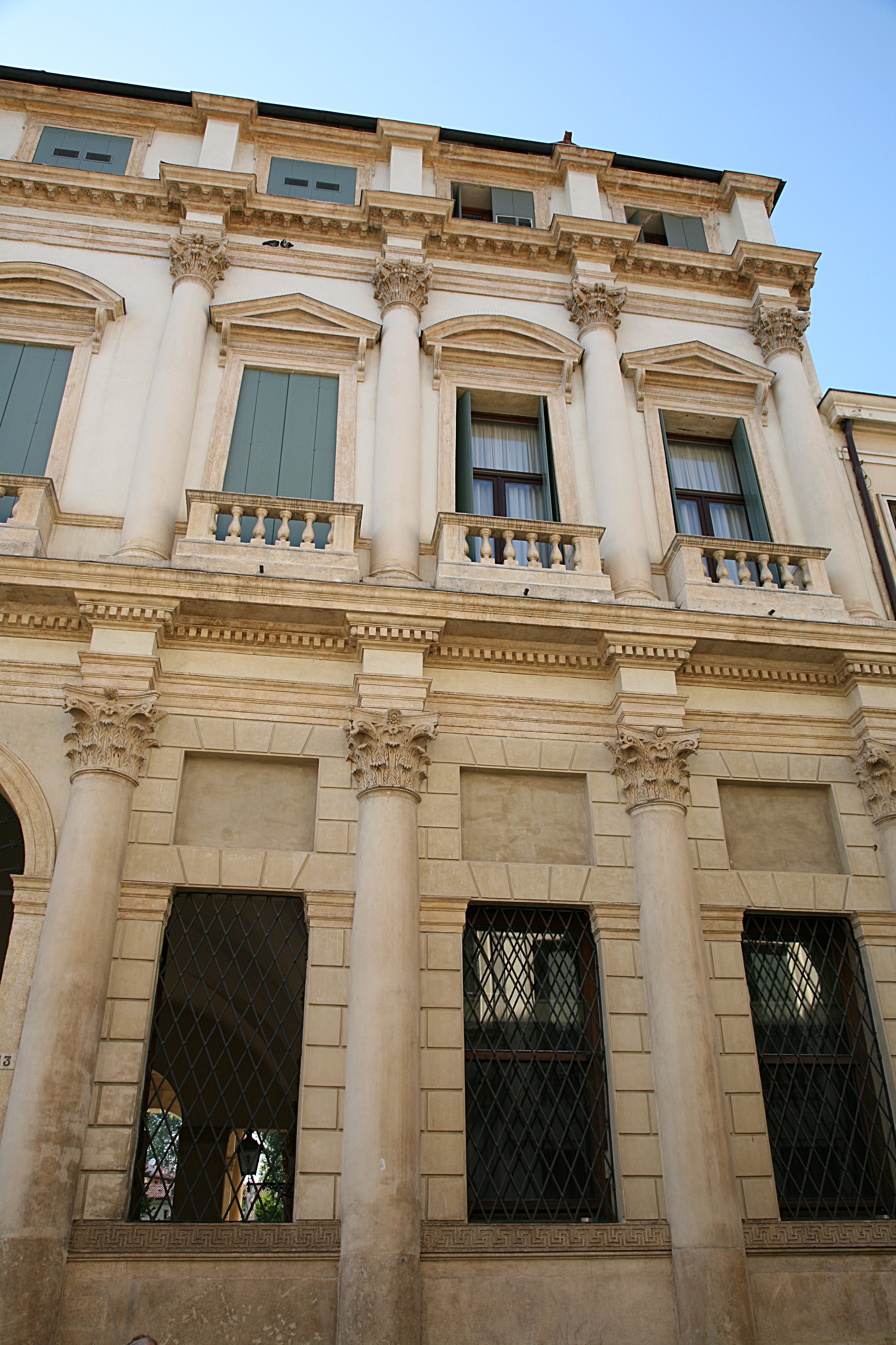 Palazzo Thiene Bonin Longare in Vicenza